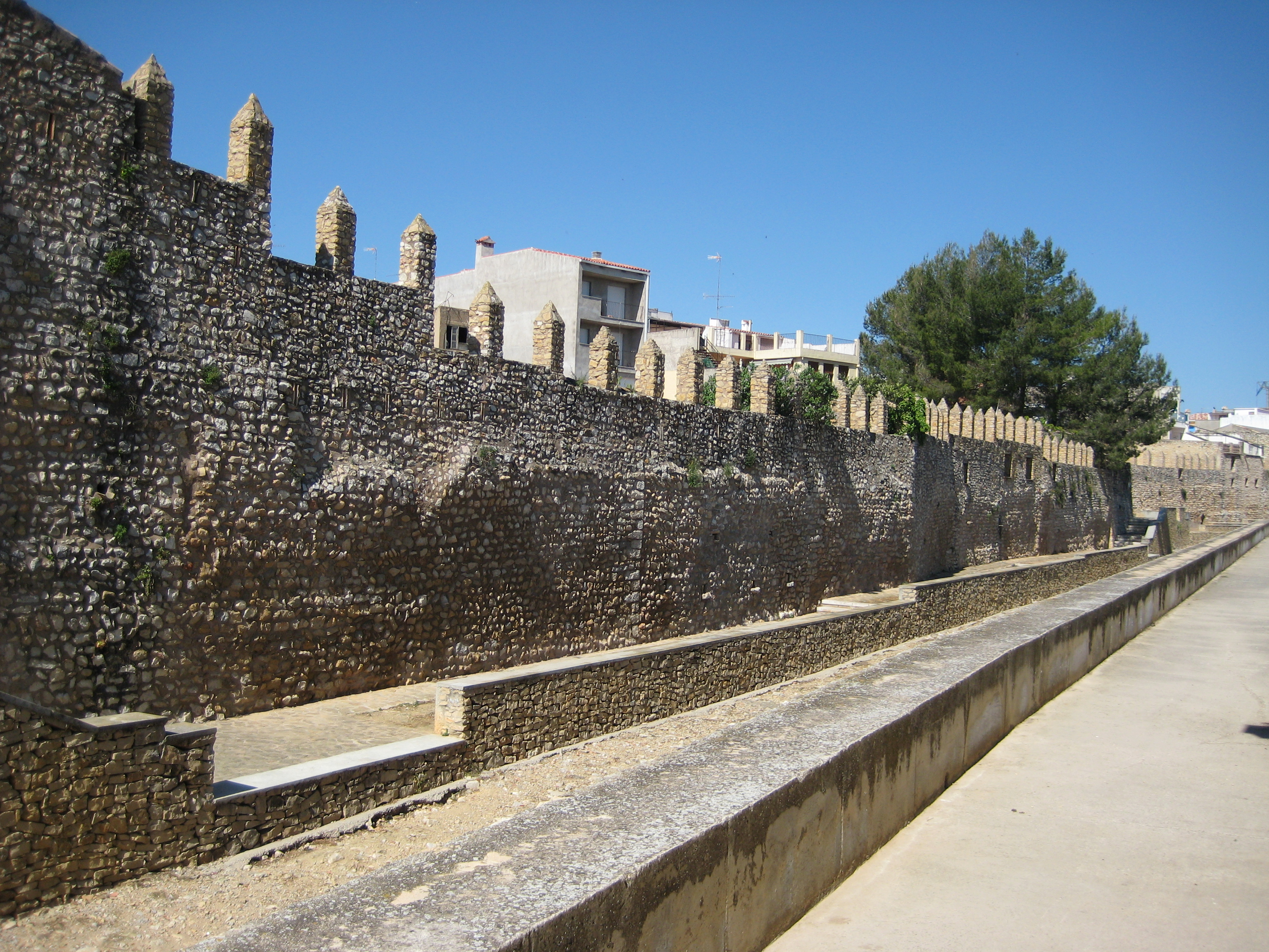 Muralles de Sant Mateu (Baix Maestrat)